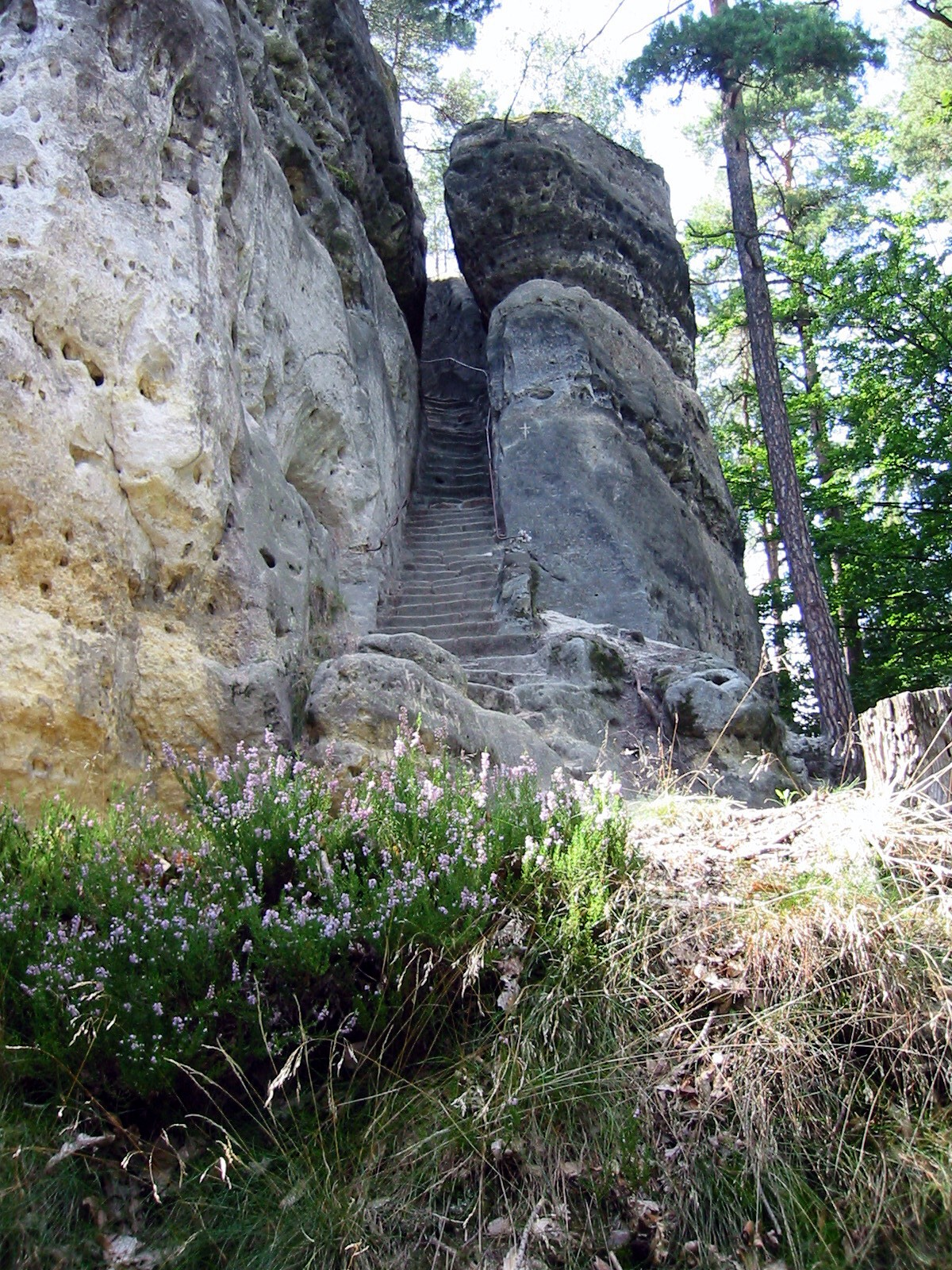 Felsenburg Stohánek, Aufgang zum Struhanken, Nordböhmen, Tschechien